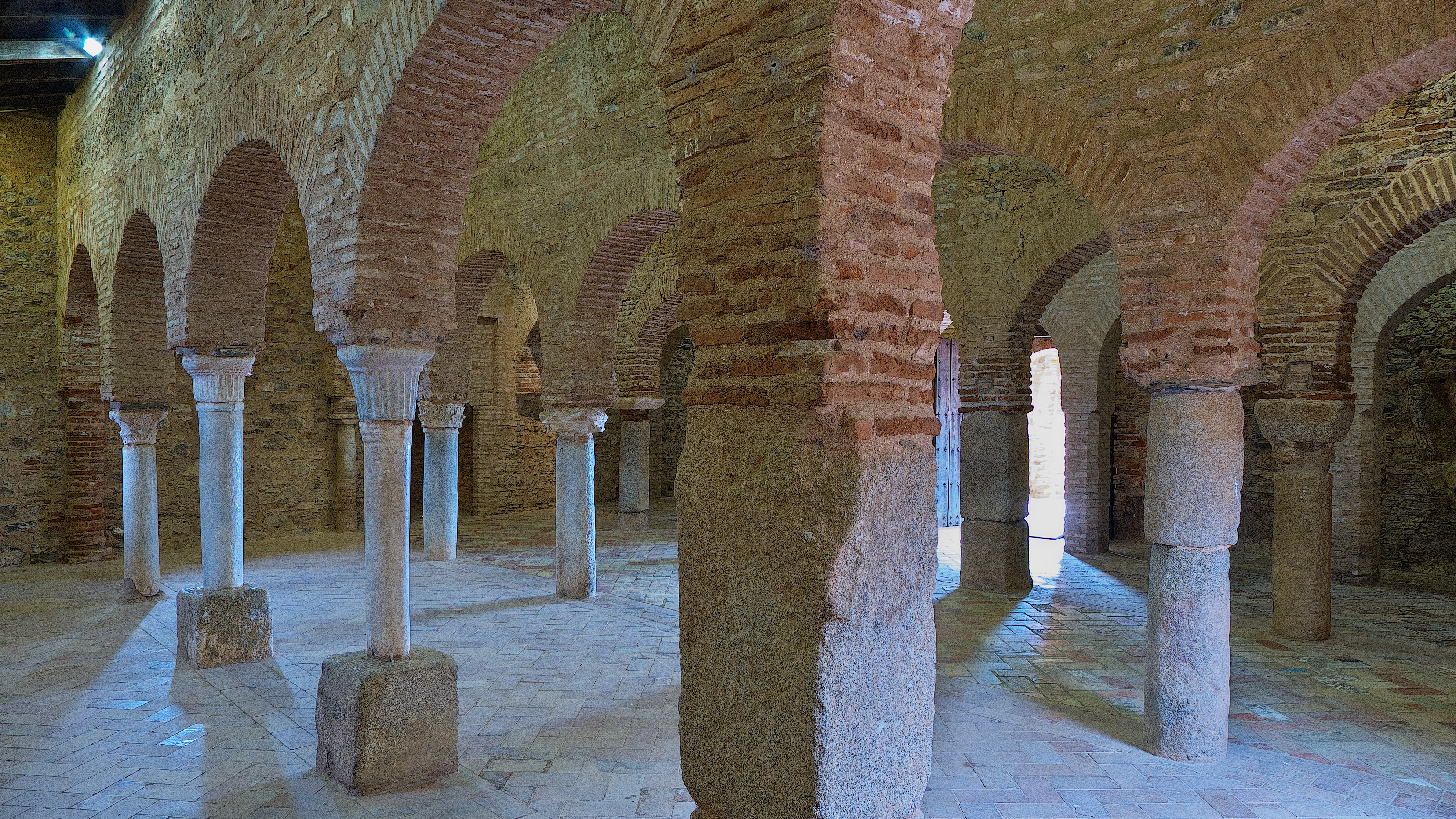 Planta cuadrada (10,7 X 11 mts.) presenta cinco naves en forma de T.